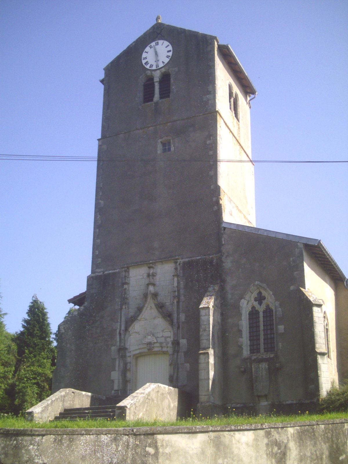 Commune de Tonnoy, église